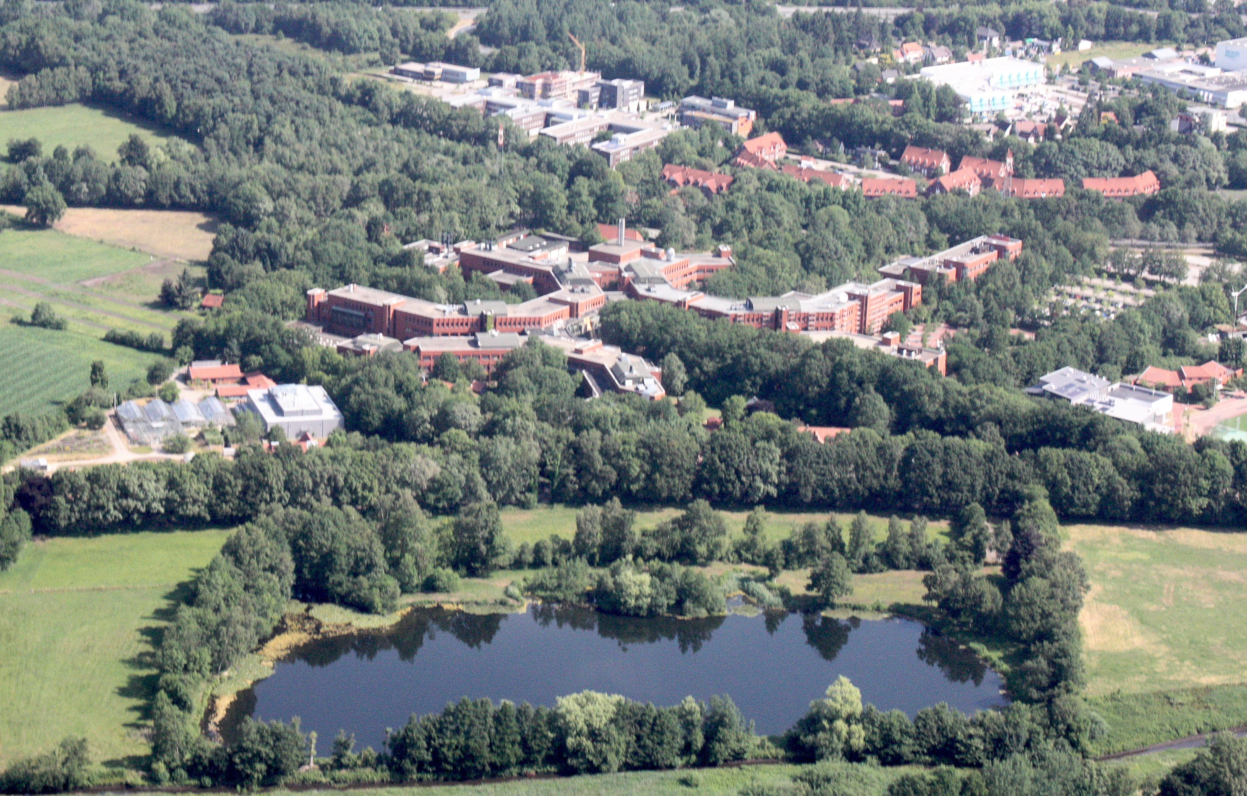 Luftaufnahmen Oldenburg (Oldenburg), mit Weiterflug nach Westen; 1500 Fuß Flughöhe; Juli 2010; Originalfoto bearbeitet: Tonwertkorrektur und Bild geschärft mit Hochpassfilter